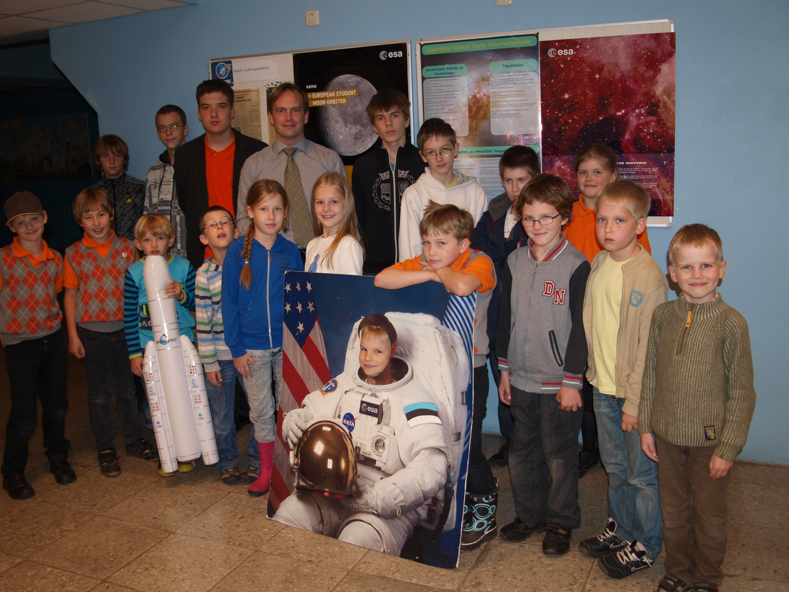 Estronaudid 2011